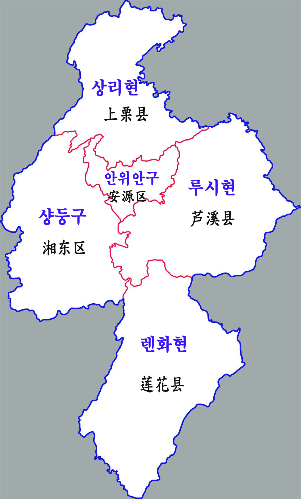 핑샹시 현급구역